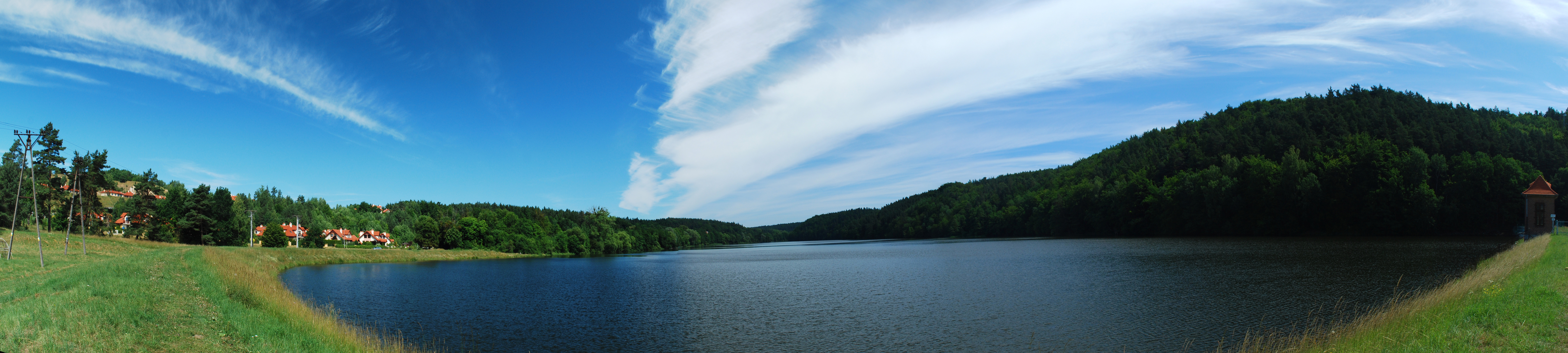 Kaskada na Raduni w Łapinie.